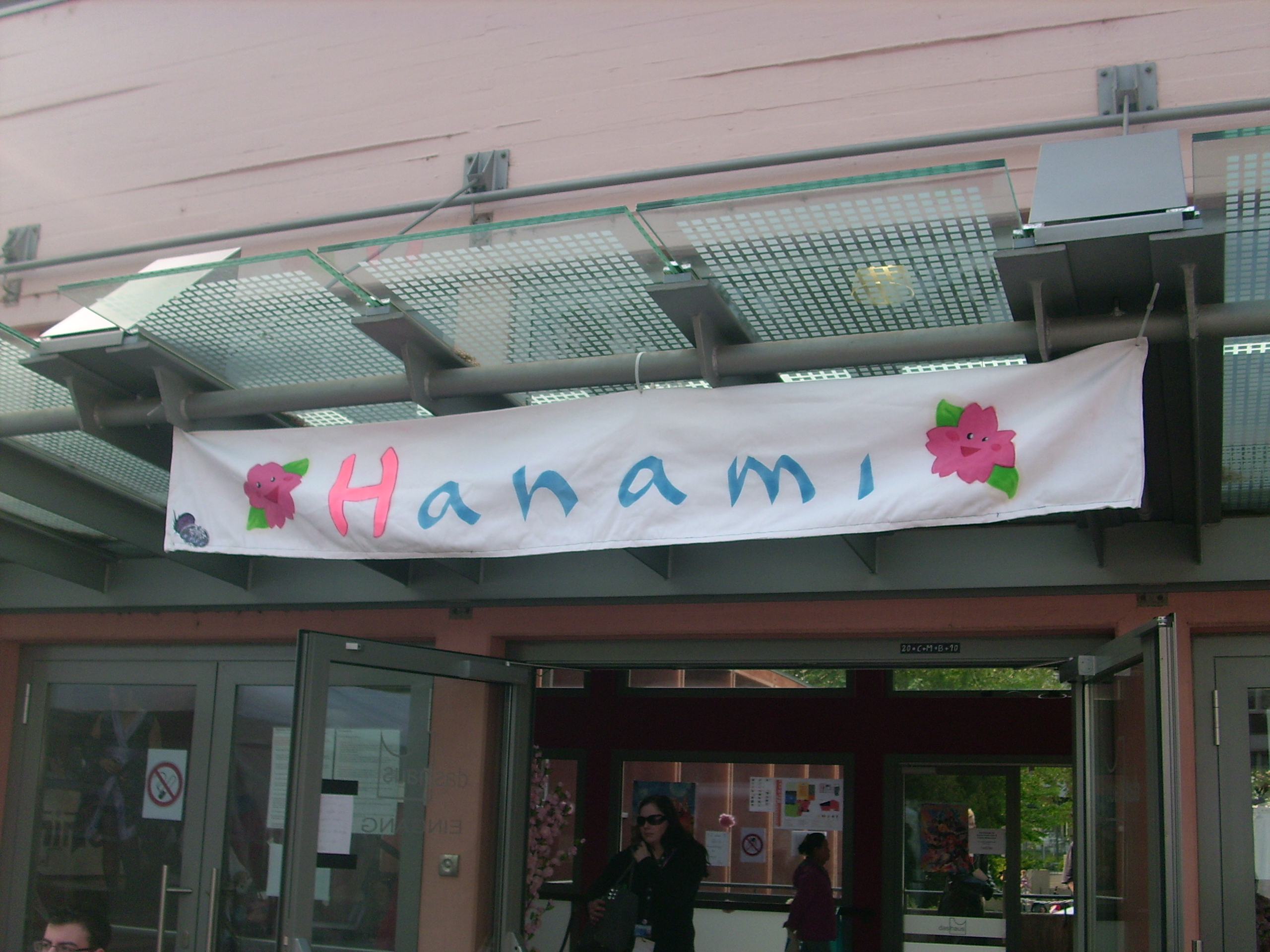 Das Banner über dem Eingang der Hanami 2010 in Ludwigshafen am Rhein.